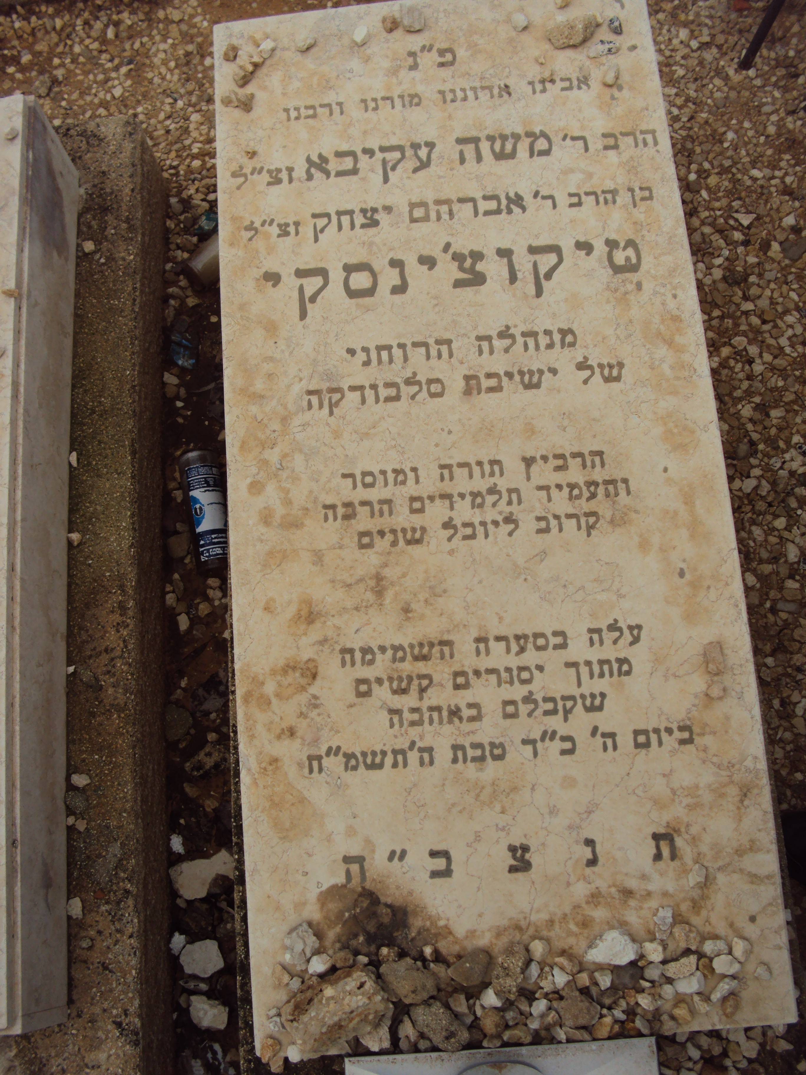 קבר הרב משה טיקוצ'ינסקי בבית הקברות שומרי שבת, זכרון מאיר, בני ברק